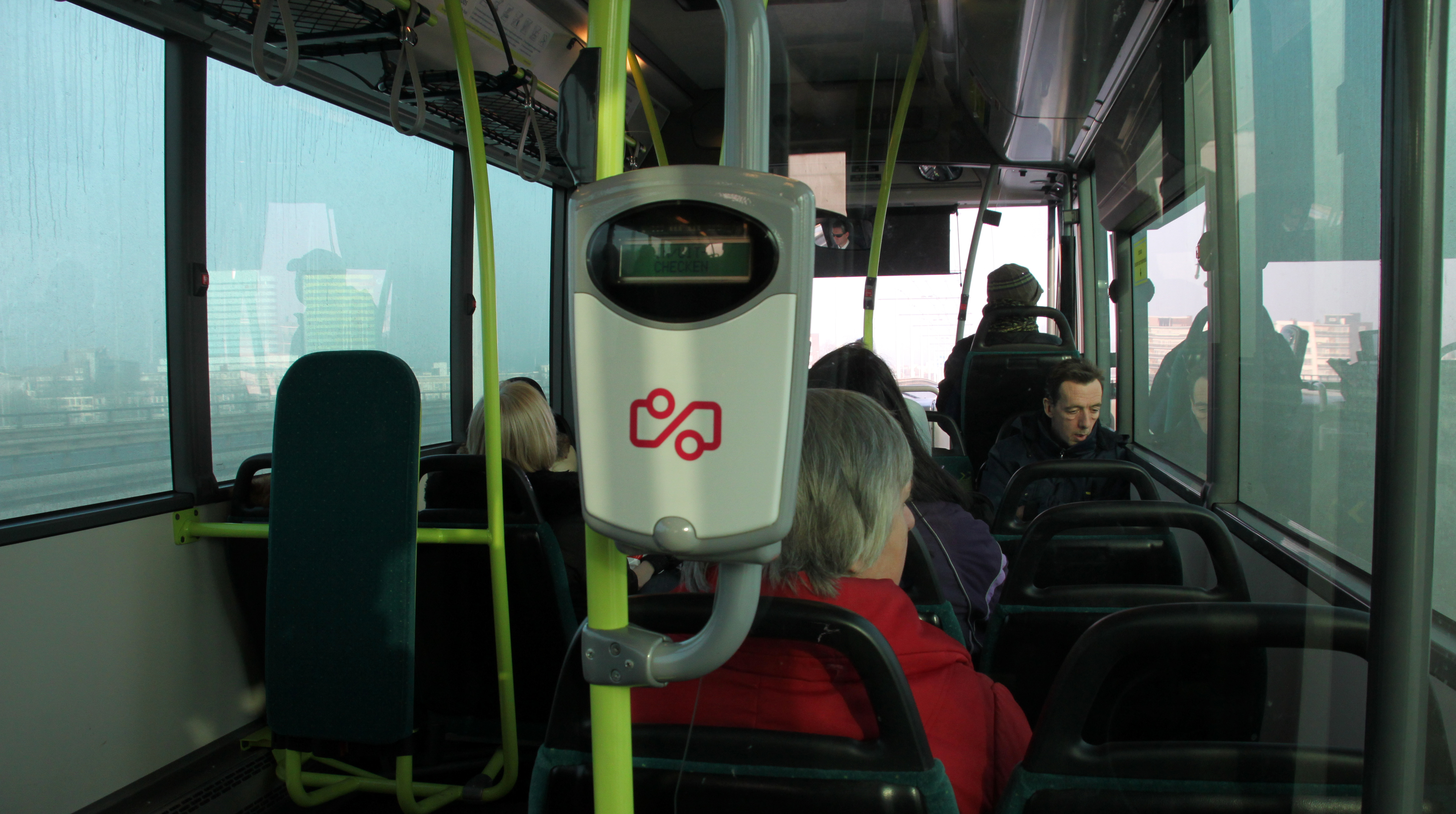 OV-chipkaart in een bus.